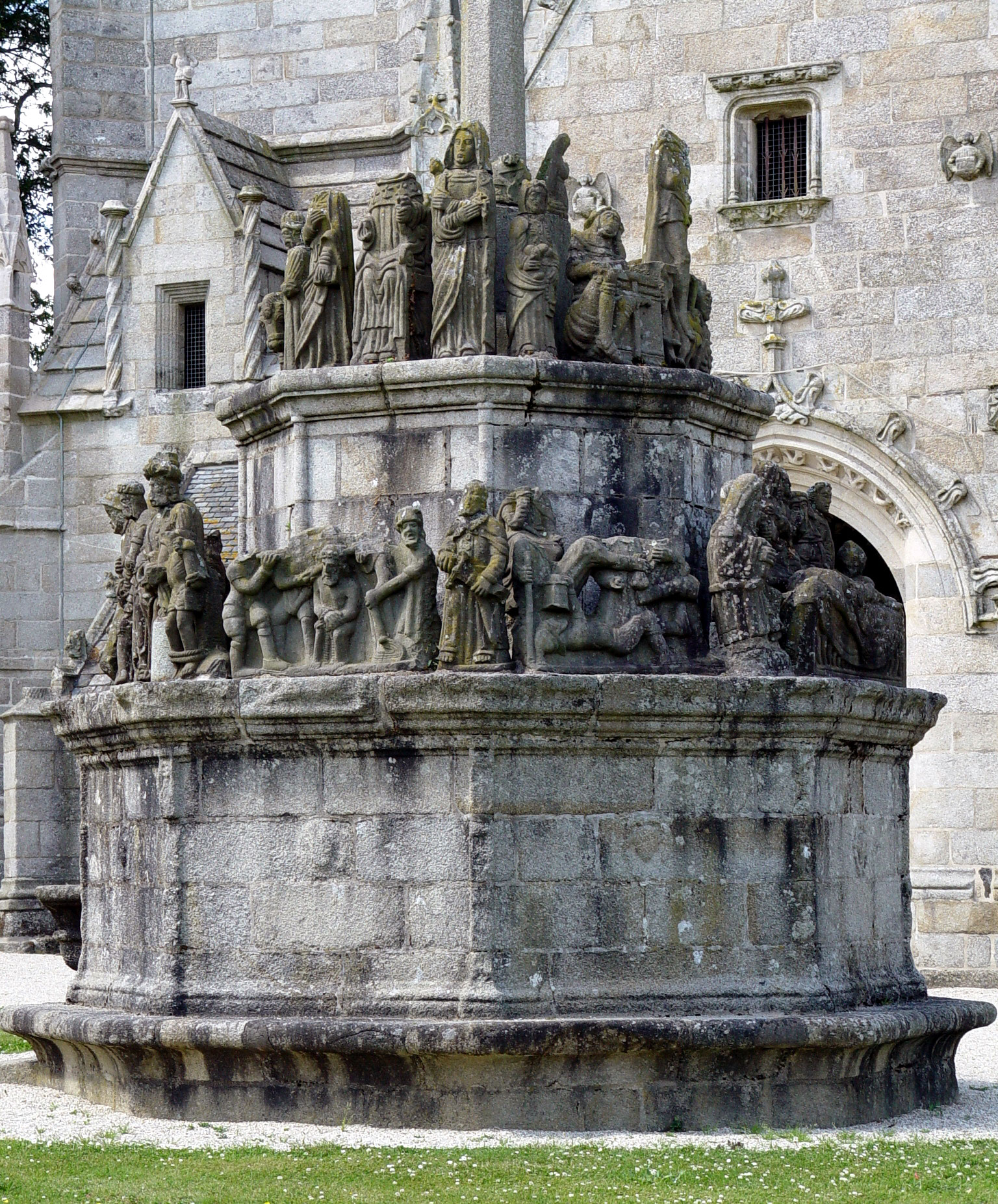 Calvaire in Kergrist-Moelou (Bretagne, Cotes d'Armor)